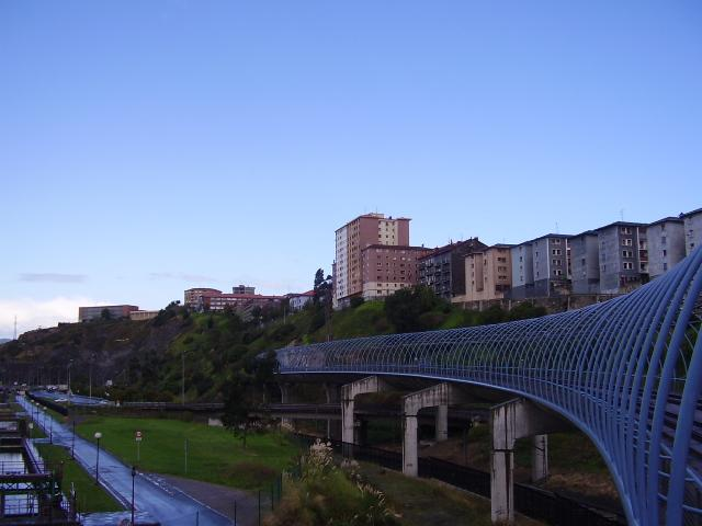 Vista de Sestao desde el Sureste, desde la estación de metro de Urbínaga (situada en el barrio de Simondrogas).